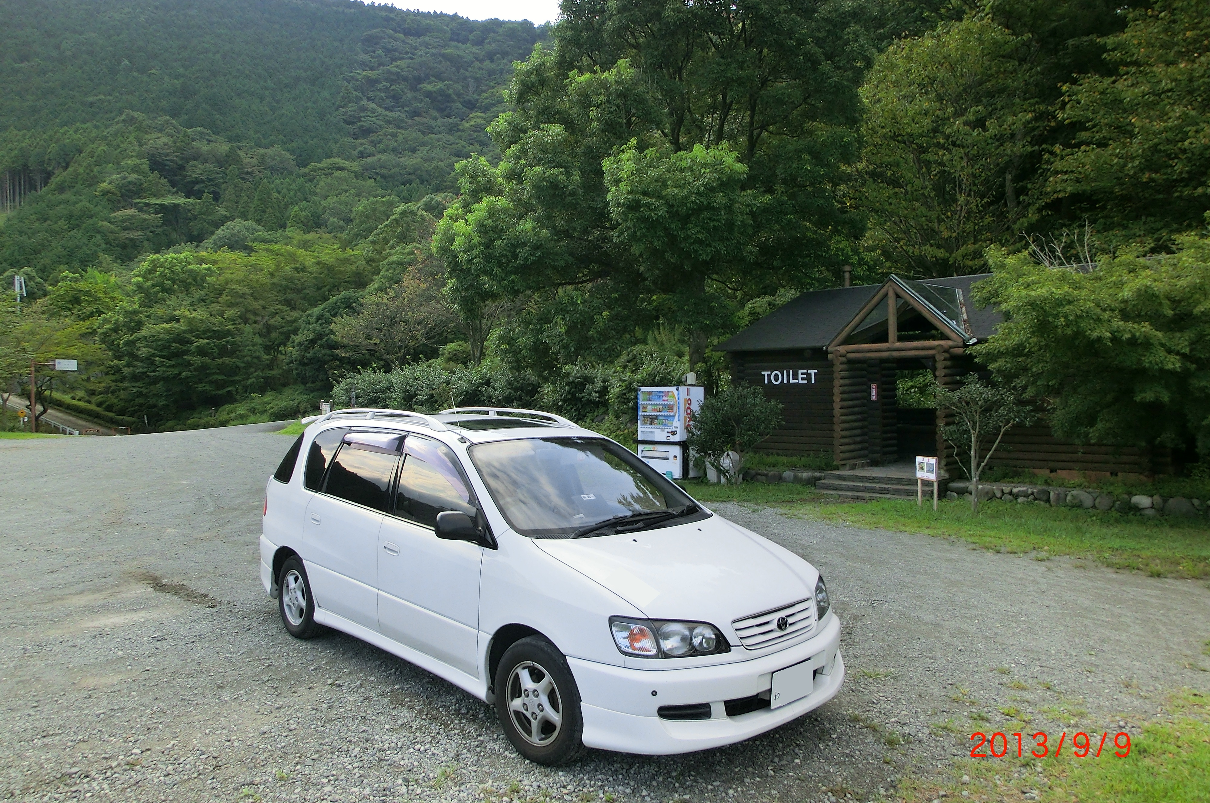 トヨタ・イプサム エアロツーリング 1998（レンタカ－）